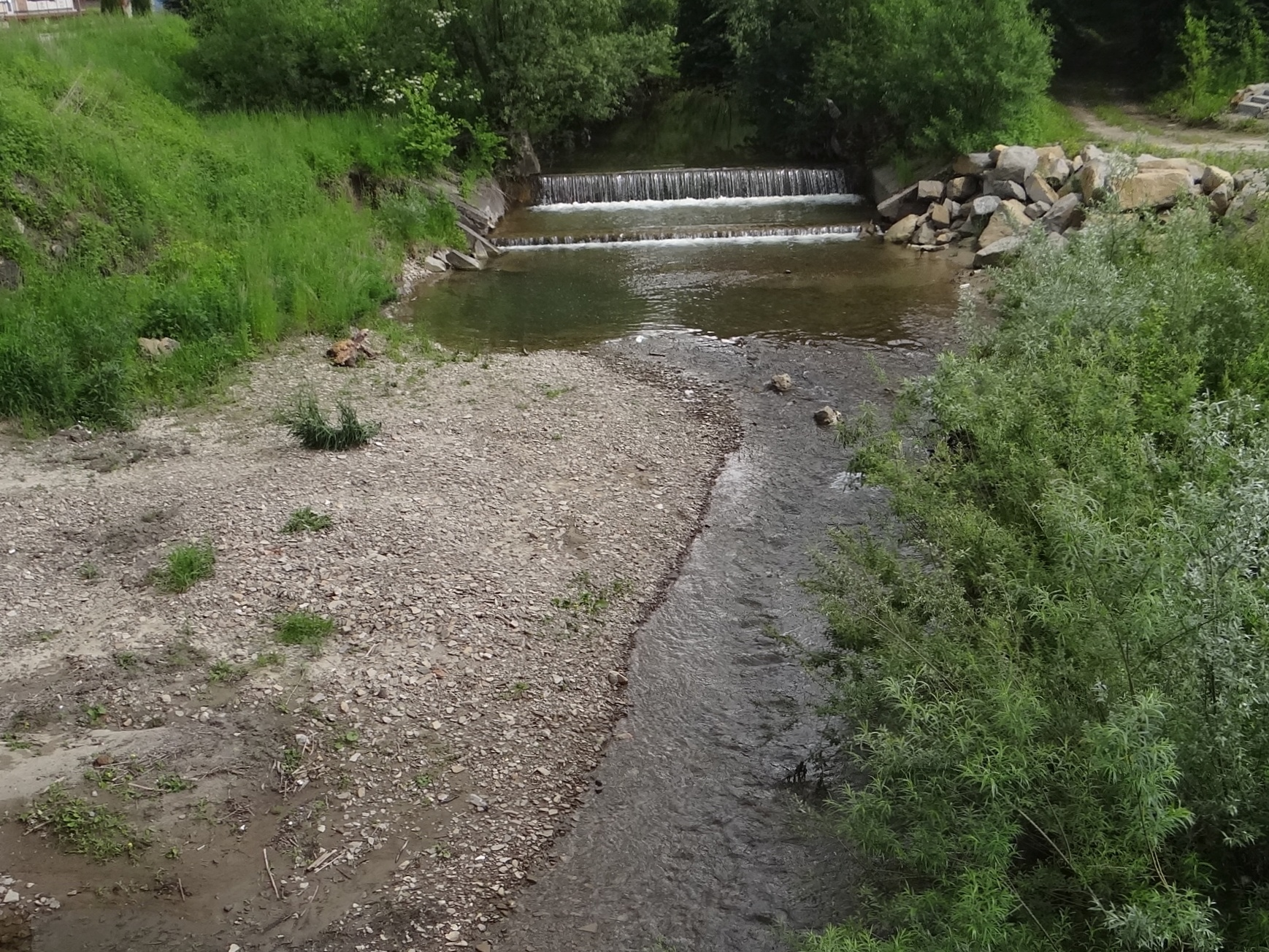 Potok Chodorówka